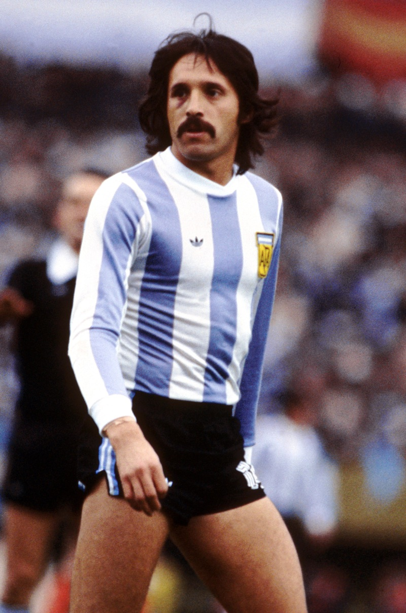 L'attaccante argentino Leopoldo Luque, componente della squadra nazionale campione del mondo di calcio del 1978